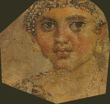 Mumienporträt wohl einer Tochter der Aline, Tempera auf Leinwand, um 24 n.Chr., gefunden in Hawara/Fayum; Ägyptisches Museum Berlin/Altes Museum, Inv.-Nr. 11413